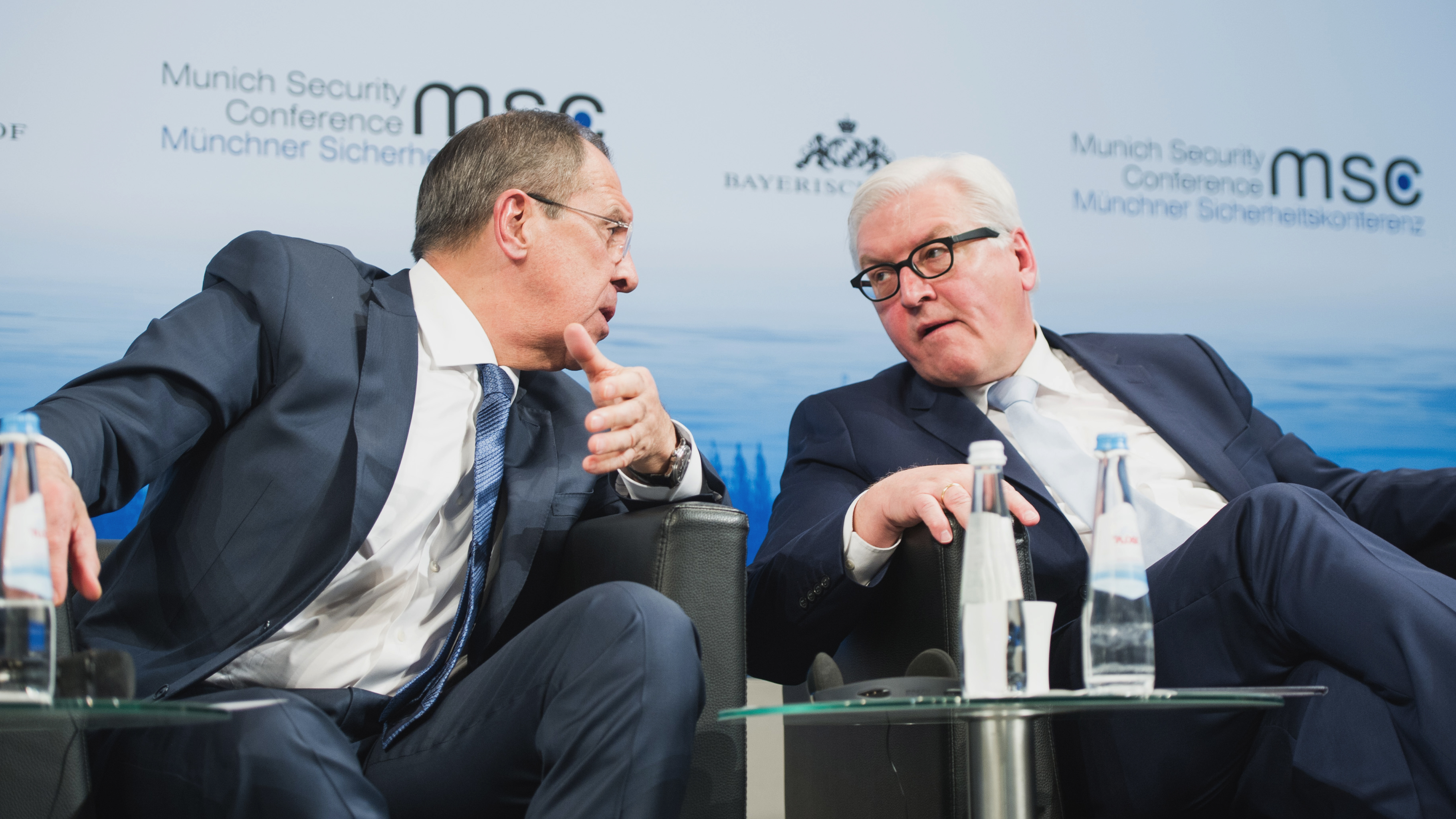 Sergei Wiktorowitsch Lawrow und Frank-Walter Steinmeiner während der Münchner Sicherheitskonferenz 2016